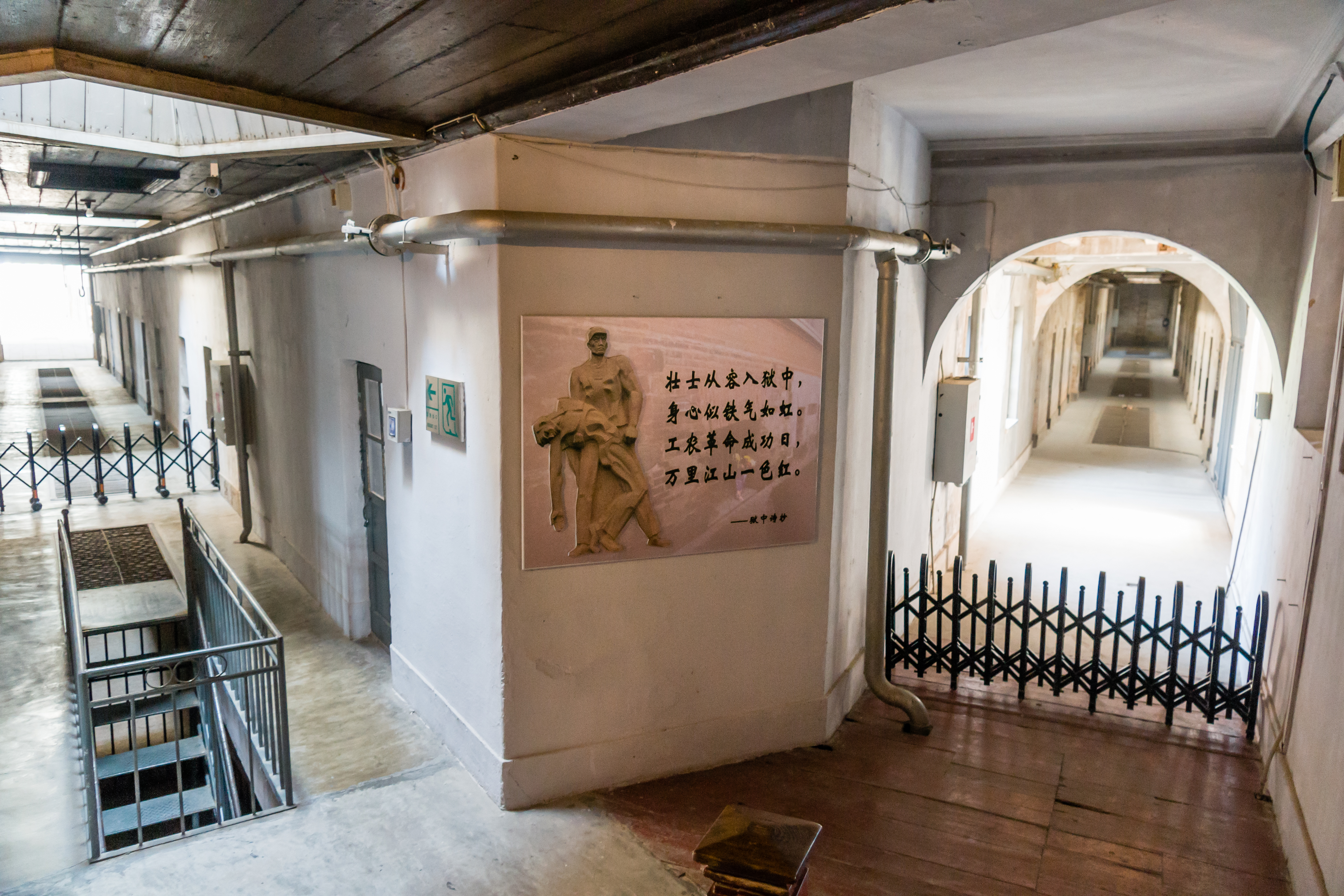 Ehemaliges Russisch-Japanisches Lüshun Gefängnis: Von einem erhöhten Platz konnten die Wächter die radial angeordneten Gefängnisflure überwachen